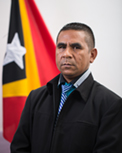 Domingos Lopes Lemos, Abgeordneter des Nationalparlaments Osttimros